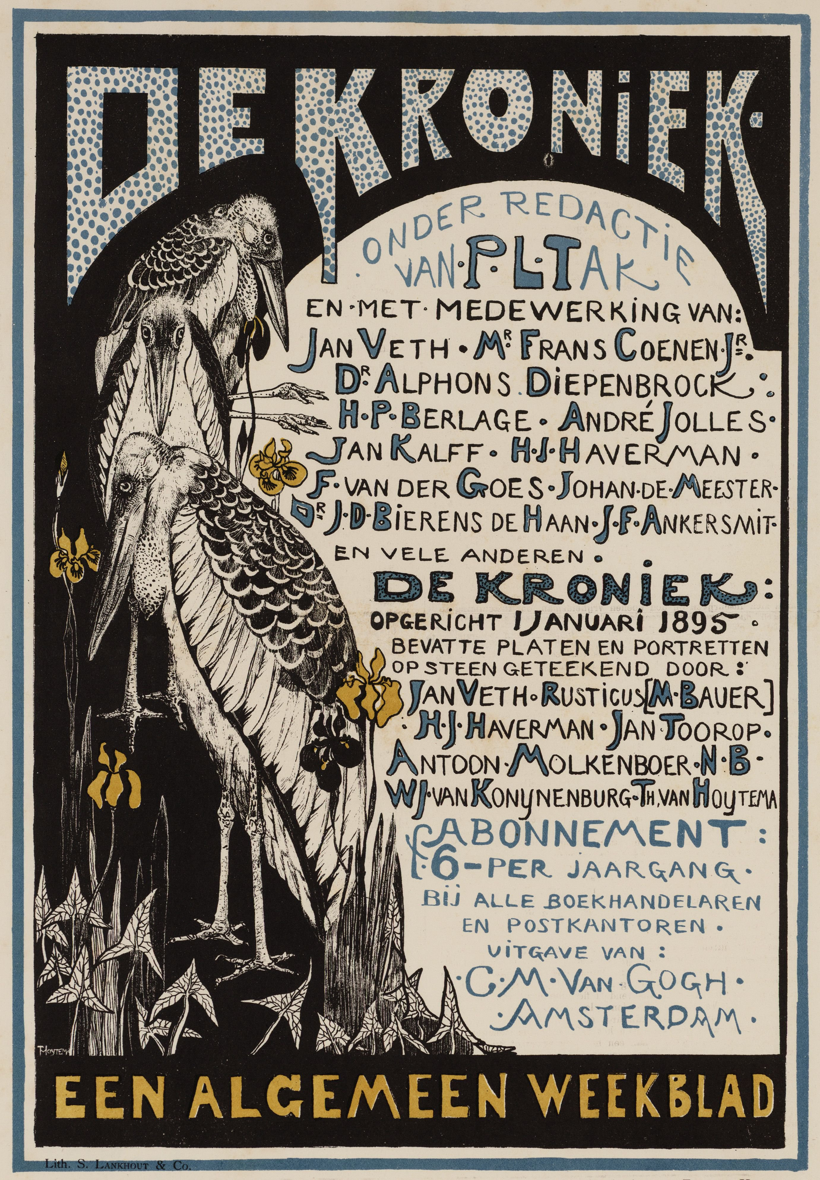 Affiche voor "De Kroniek", een algemeen weekblad. Techniek: steendruk in kleur. Afmetingen: 410 x 300 mm.